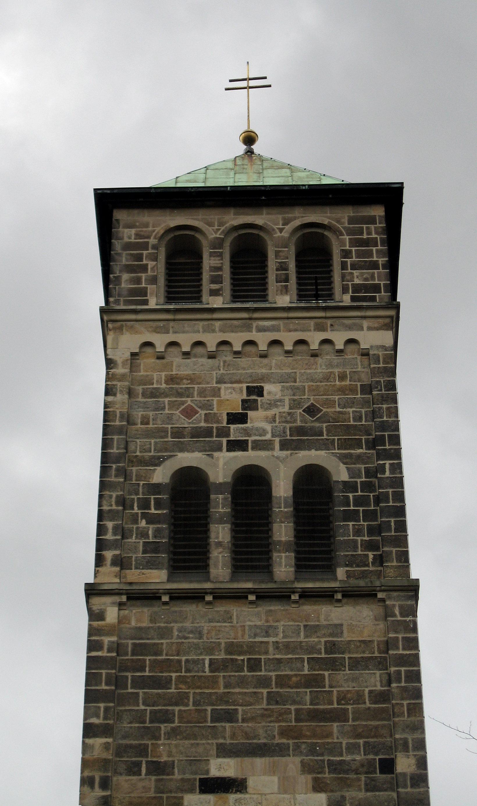 Dortmund, Nordstadt, Borsigplatzquartier, St. Dreifaltigkeitskirche, Flurstraße 10, Turm